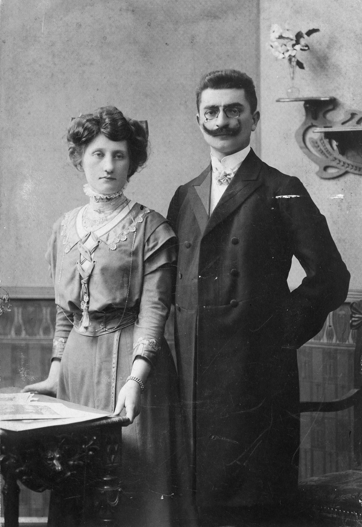 Juliusz Zieliński ze swą narzeczoną/żoną Marią, ok. 1912